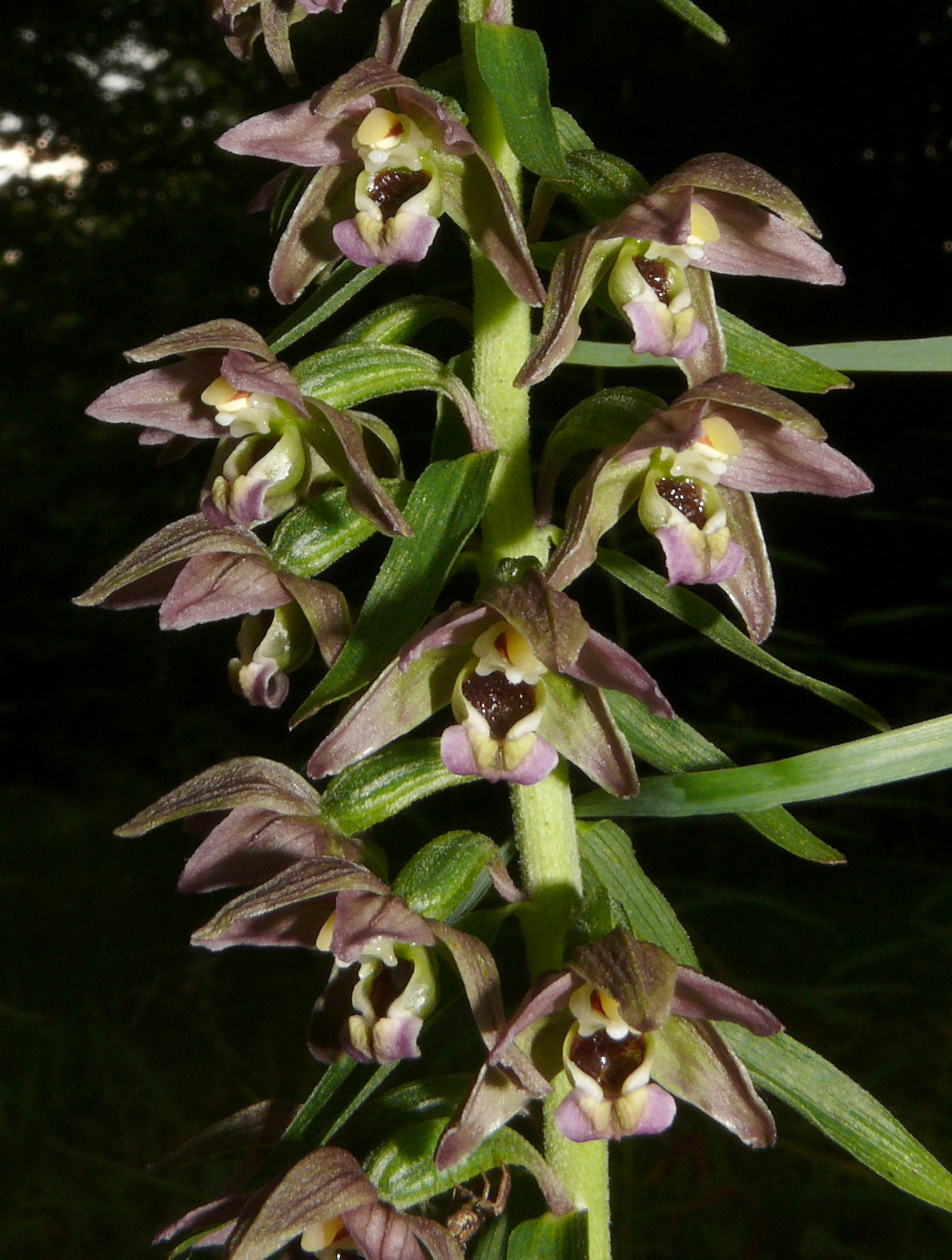 Epipactis helleborine, Schwäbisch-Fränkische Waldberge, Germany